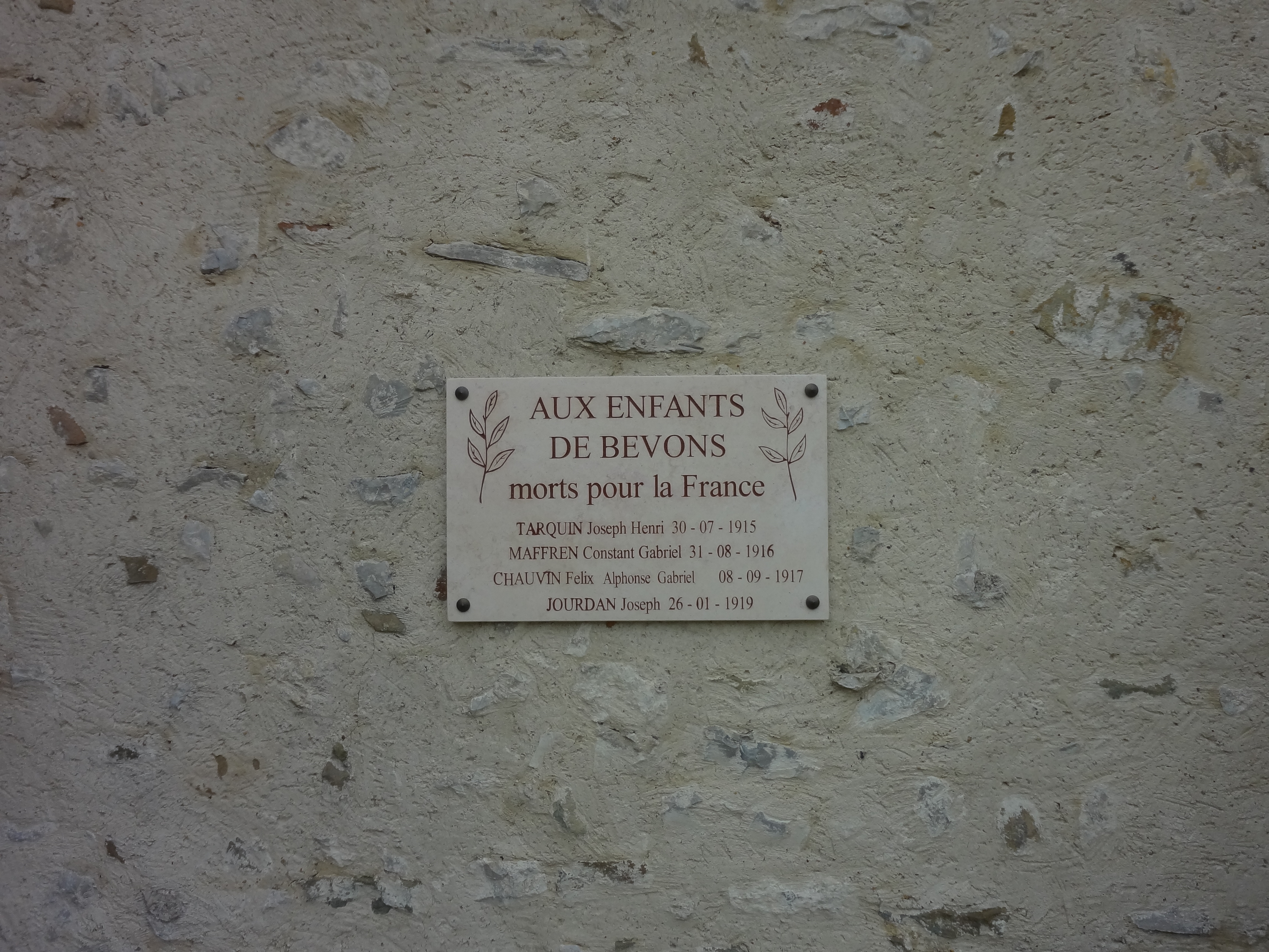 Plaque aux morts de 1914-1918 de Bevons sur le mur nord de l'église Saint-Gervais-Saint-Protais, et dans le cimetière